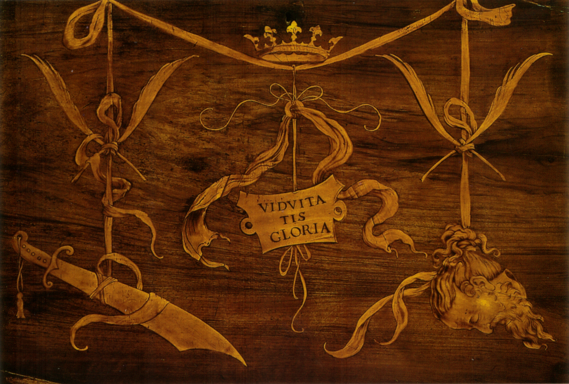 8.02 viduitatis gloria